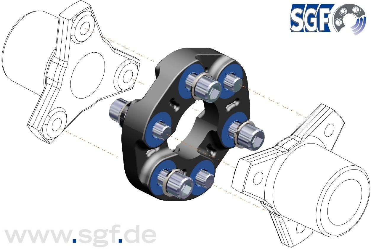 Explosionsansicht einer SGF Antriebsgelenkscheibe mit Standardflanschen